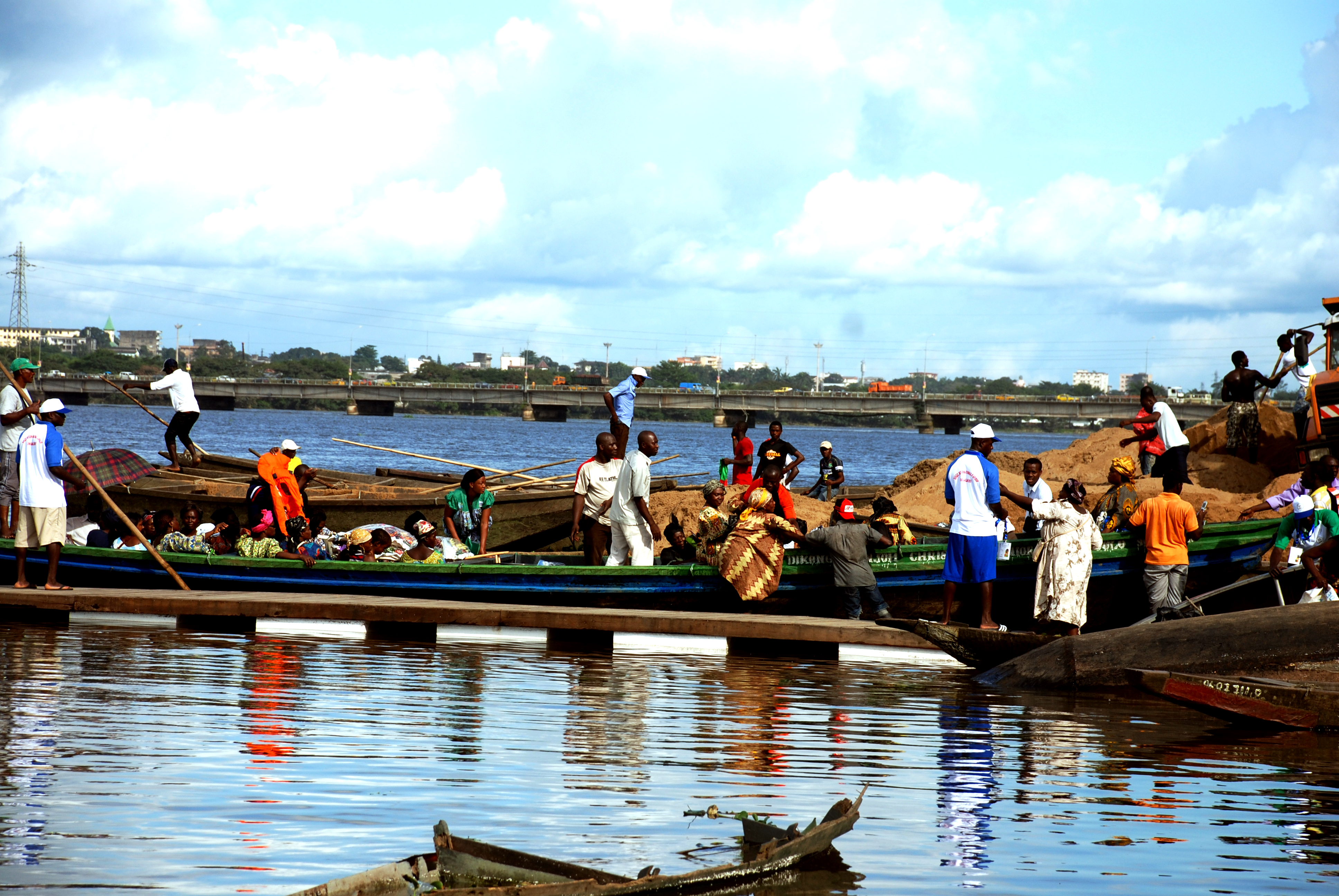 Des voyageurs en partance pour le village Jebale au Cameroun This is an image with the theme "Africa on the Move or Transport" from: Cameroon